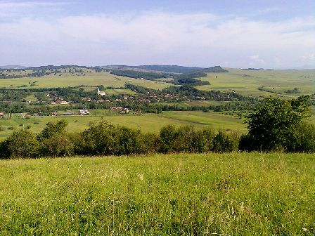 Deményháza a márkodi tetőről